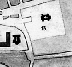 Беларуская (тарашкевіца): Менск (Miensk). Фрагмэнт пляну места з Фарным касьцёлам (13)